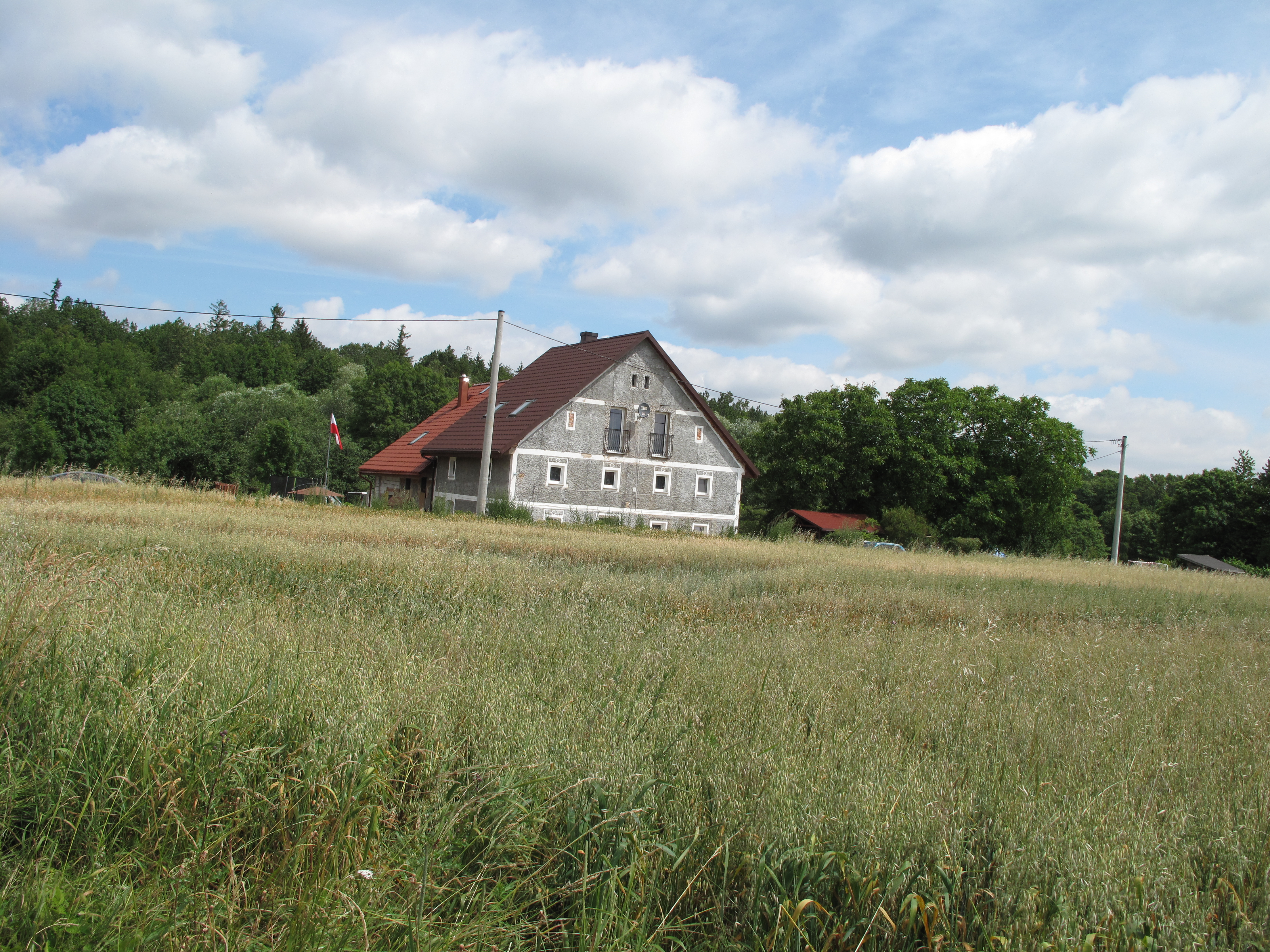 Muchówek. Polska.